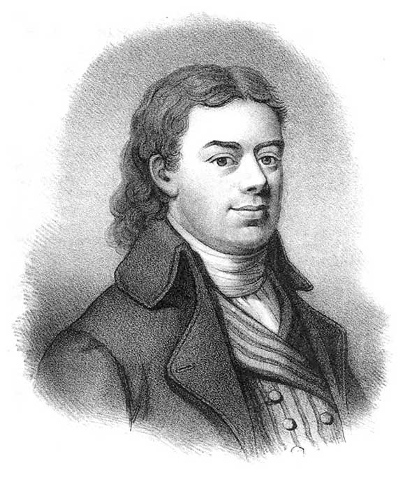 Per af Bjerkén (1765-1818)